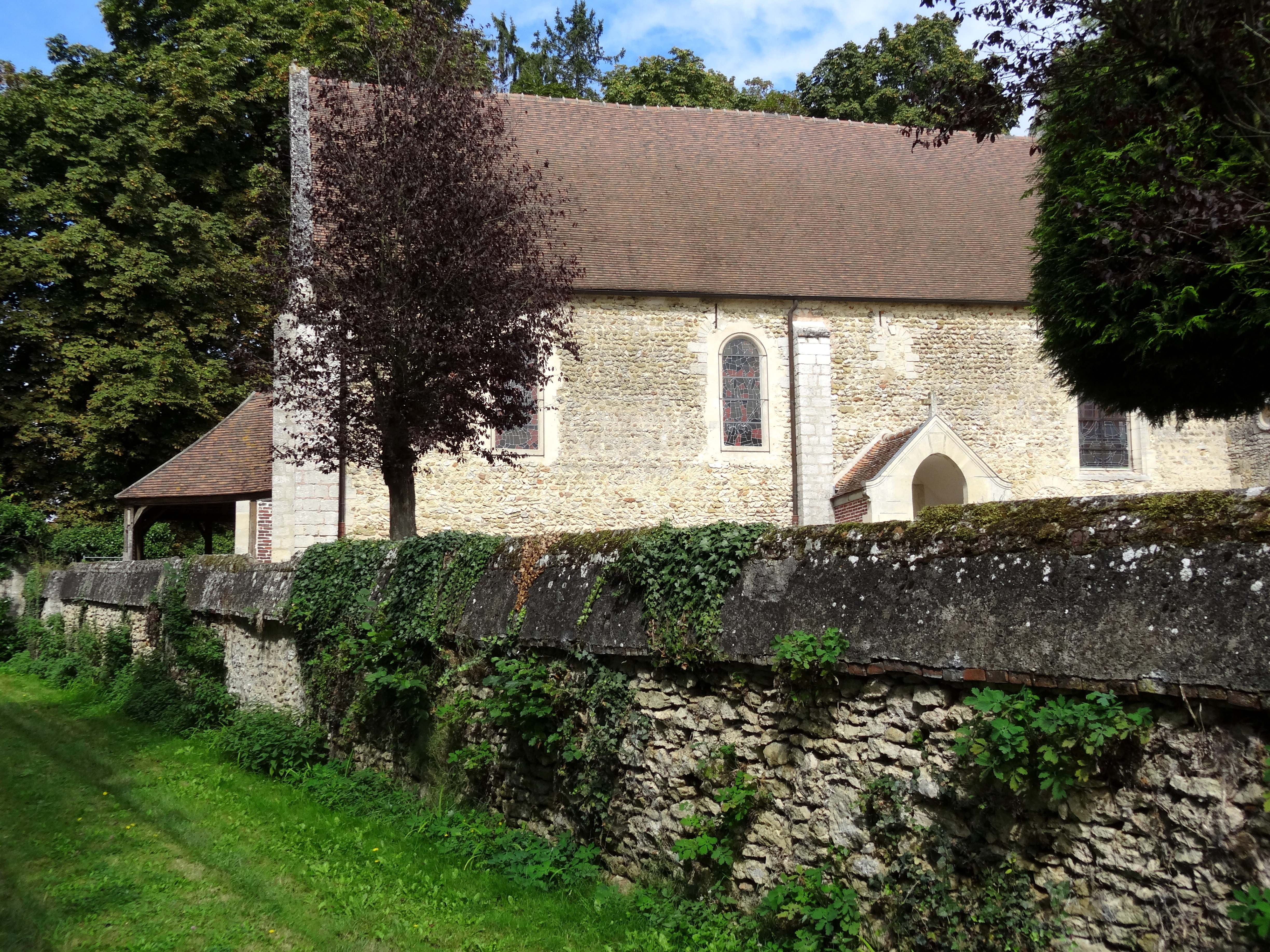 Église Saint-Remi de Ponchon - voir titre.